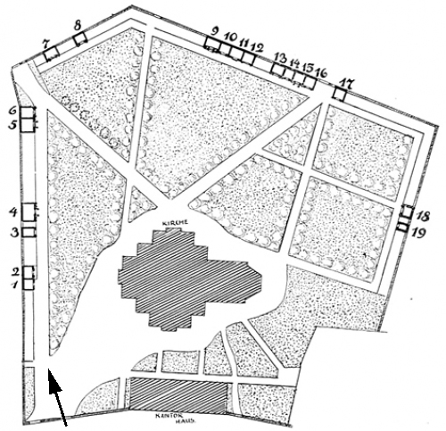 Skizze des Gnadenfriedhofs in Jelenia Góra (Hirschberg) aus dem Jahr 1916 von Günther Grundmann